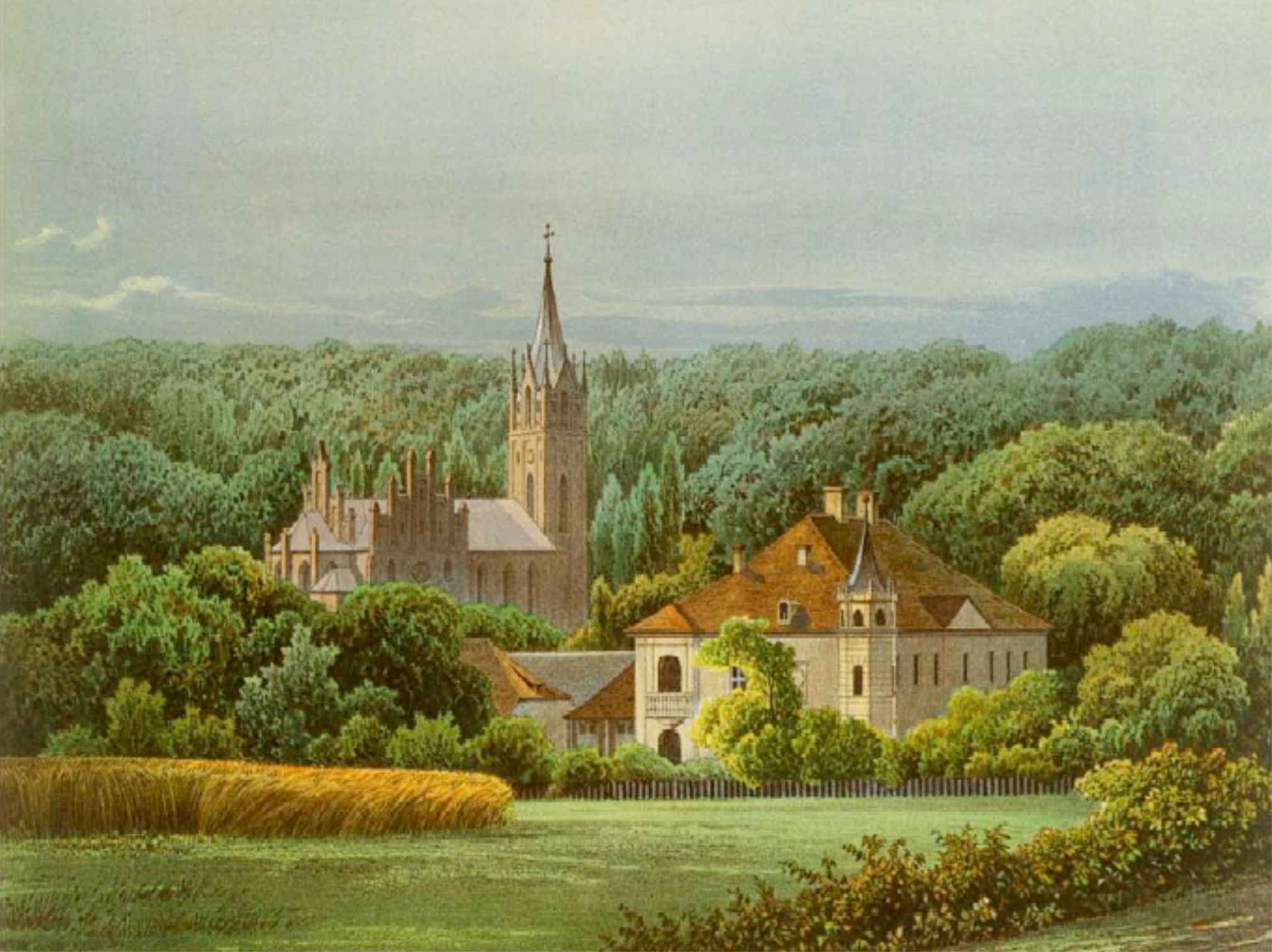 Aquarell vom Schloss und Kirche Reitwein